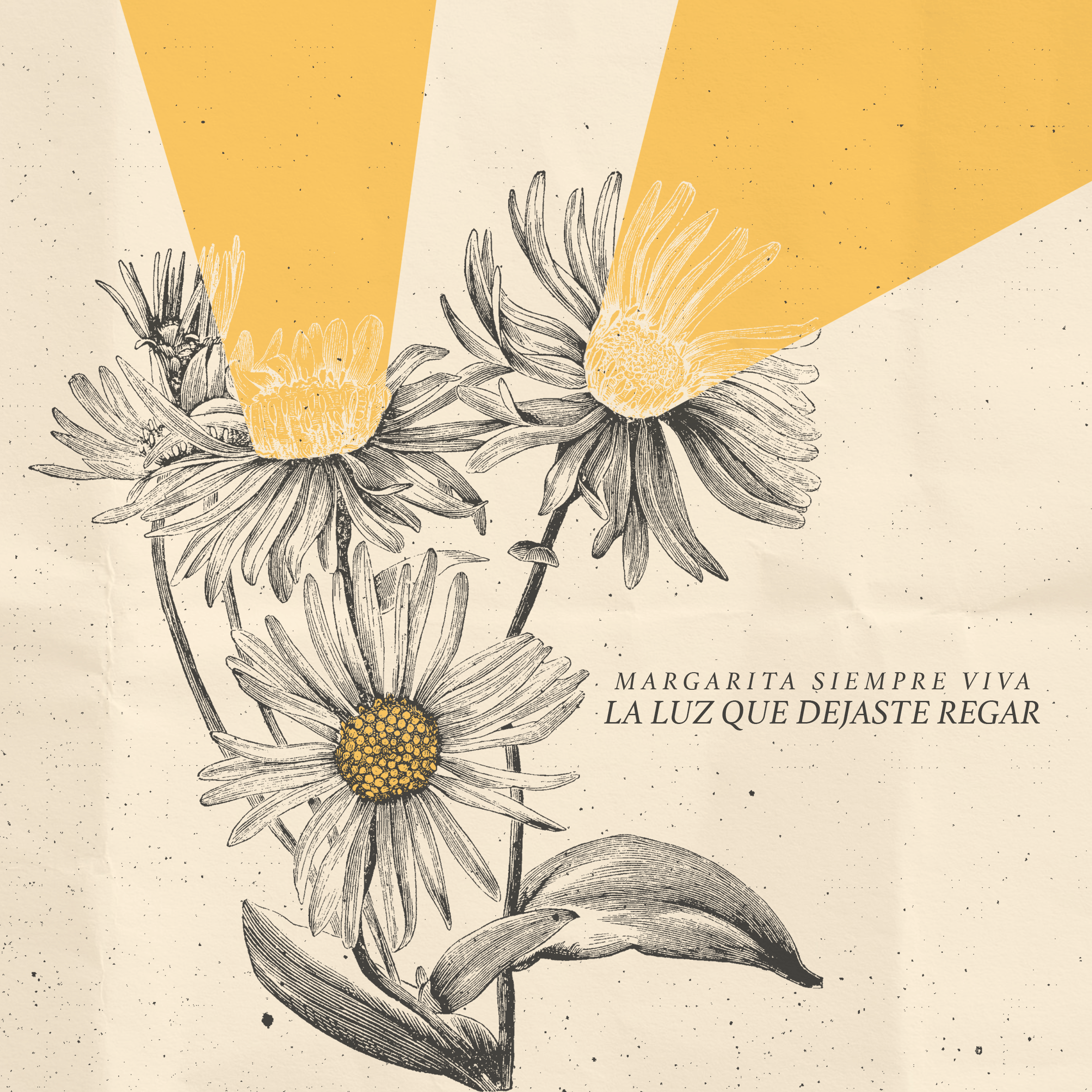 Primer álbum de la banda Colombiana Margarita Siempre Viva. La Luz Que Dejaste Regar (2017)